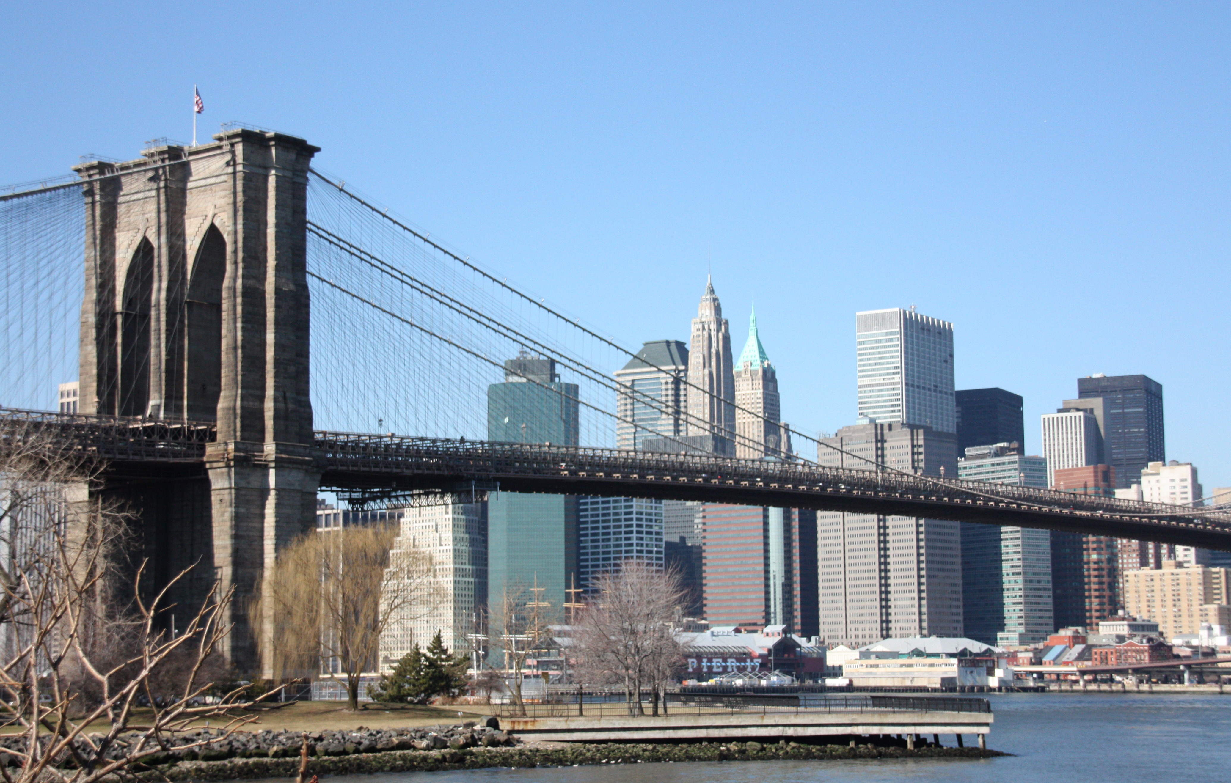 Brooklin Bridge